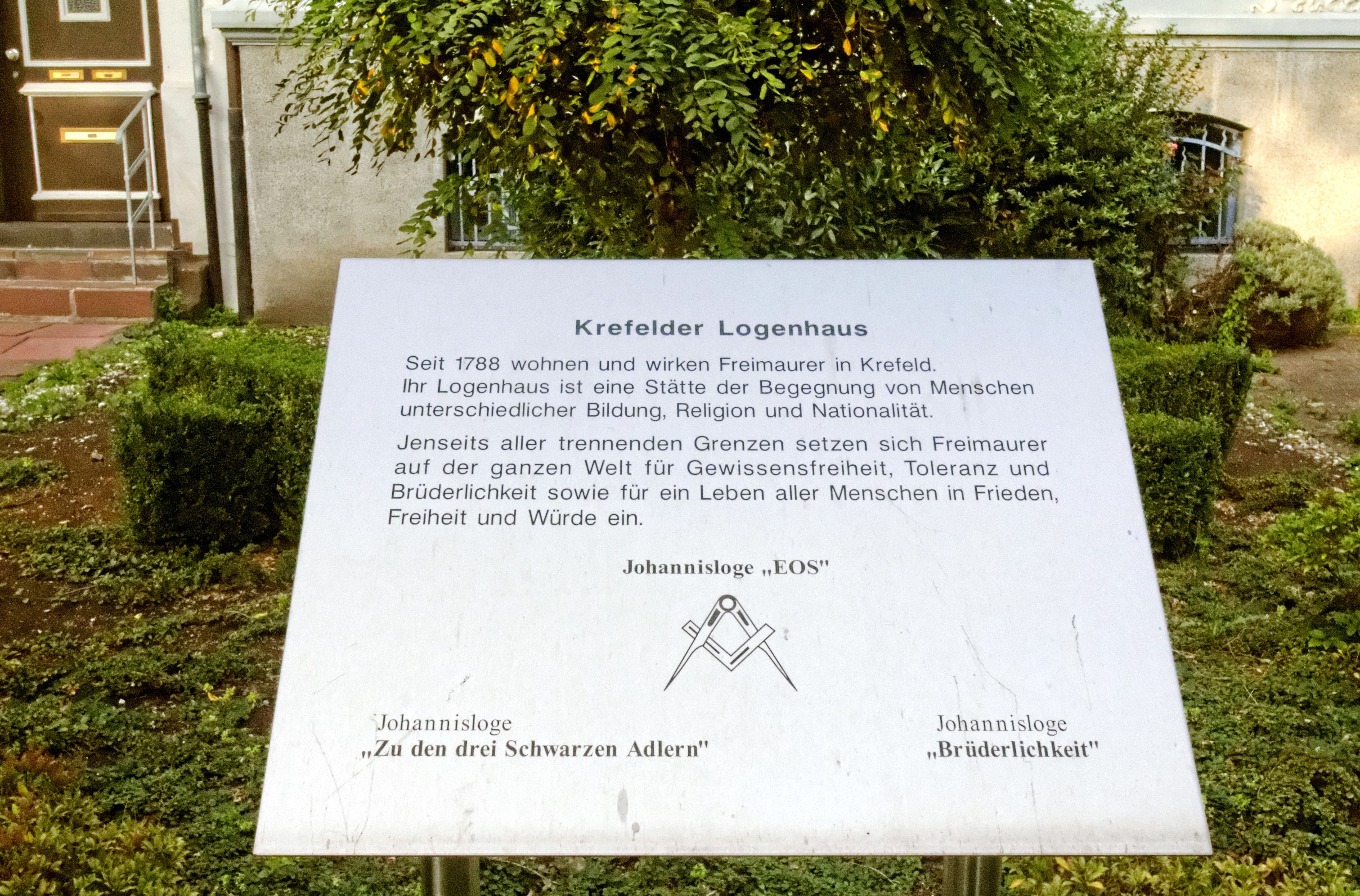 Krefeld, Bismarckstraße Tafel vor dem Logenhaus